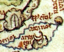 Psalter world map, Arca noe